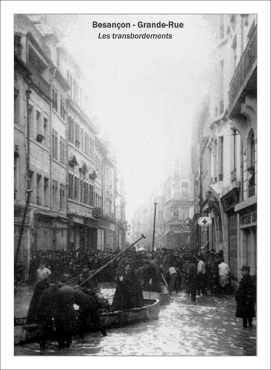 La Grande rue lors de la crue du Doubs de 1910 à Besançon (Doubs, France).